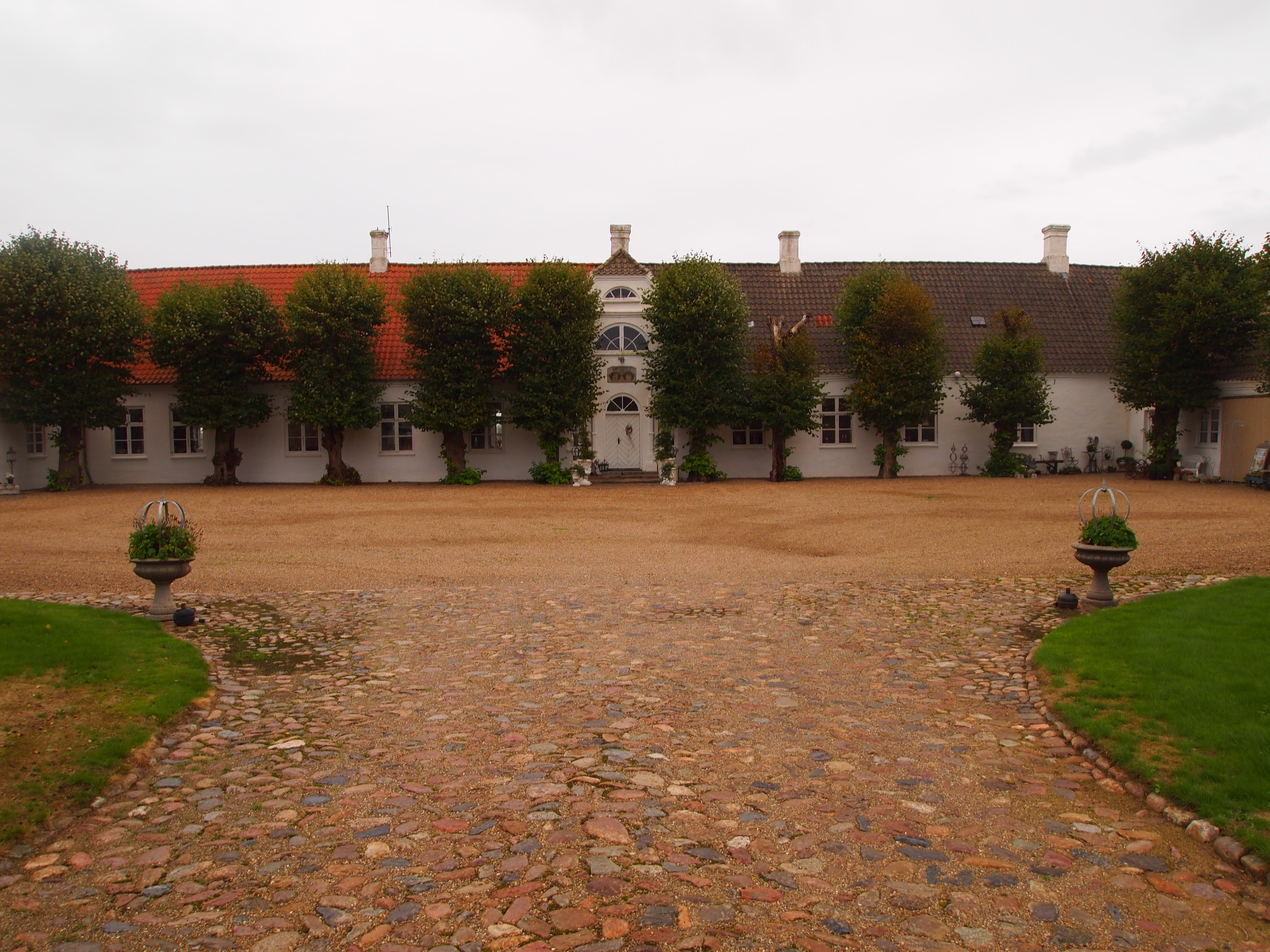 Handbjerg Hovgård